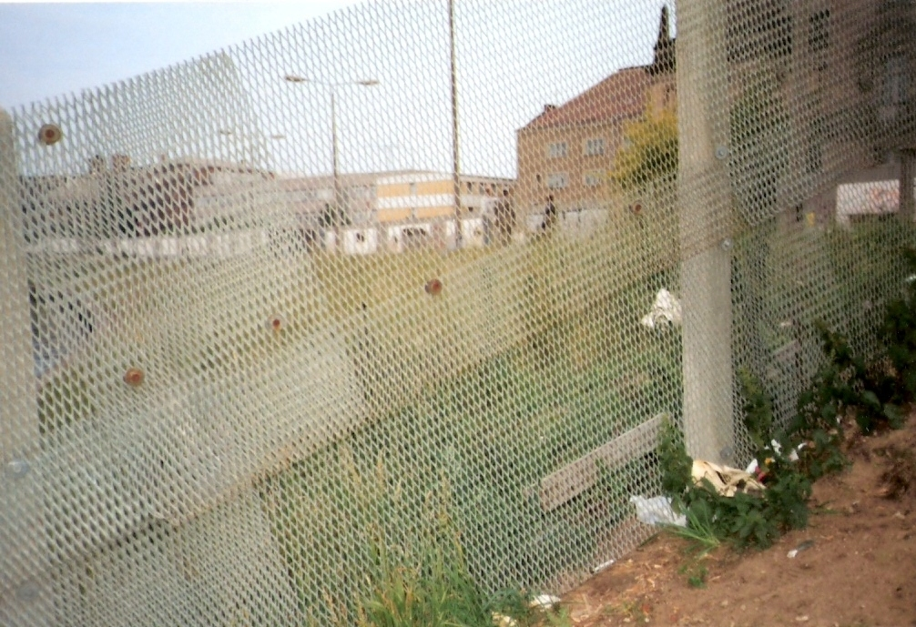 Streckmetallgitterzaun im Grenzbereich Berlin, Anfang 1990